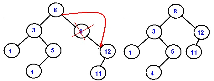 primjer brisanja